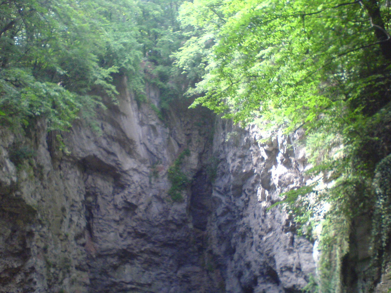 Propast u Hranic na moravě